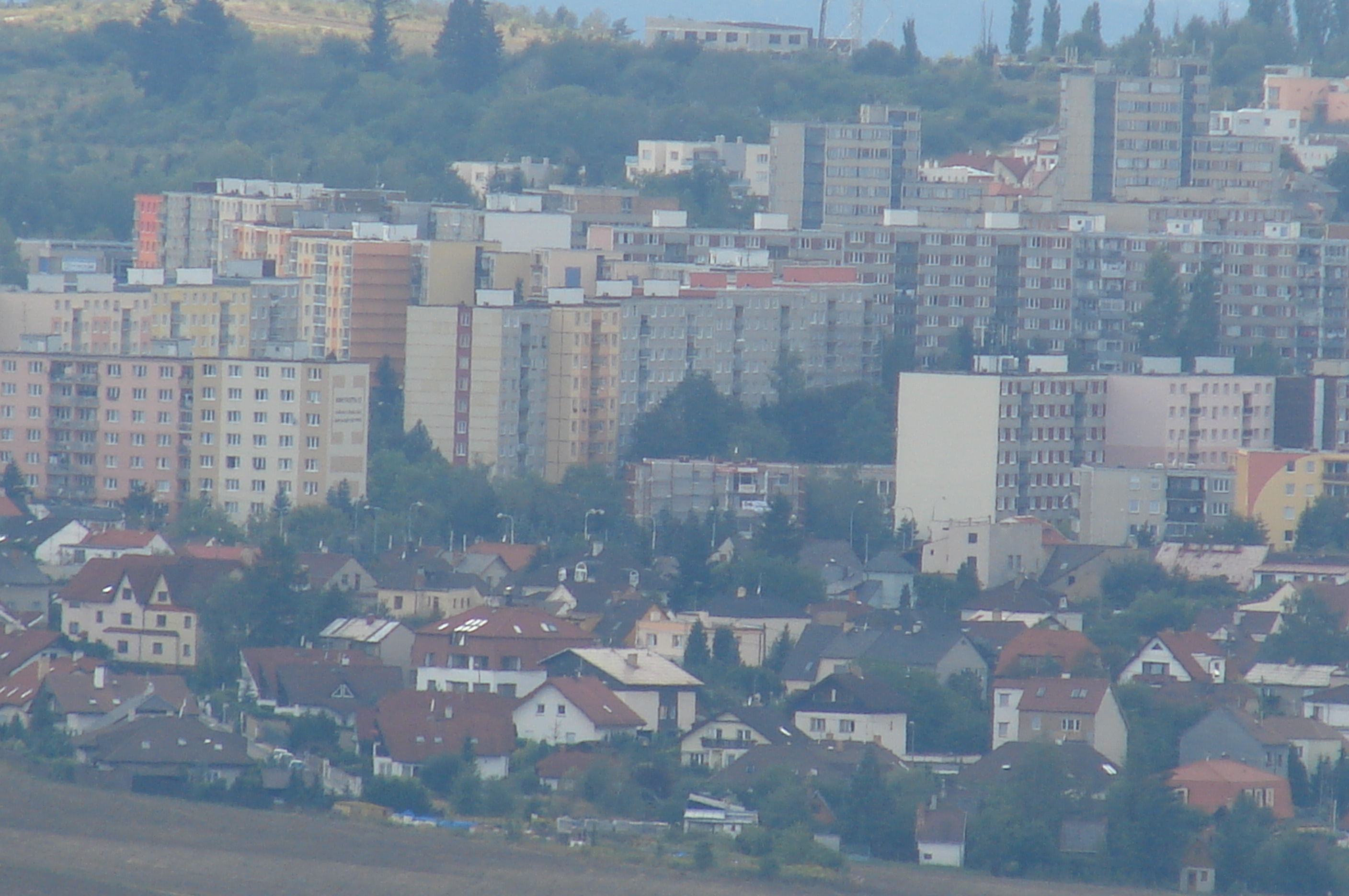 Lochotín